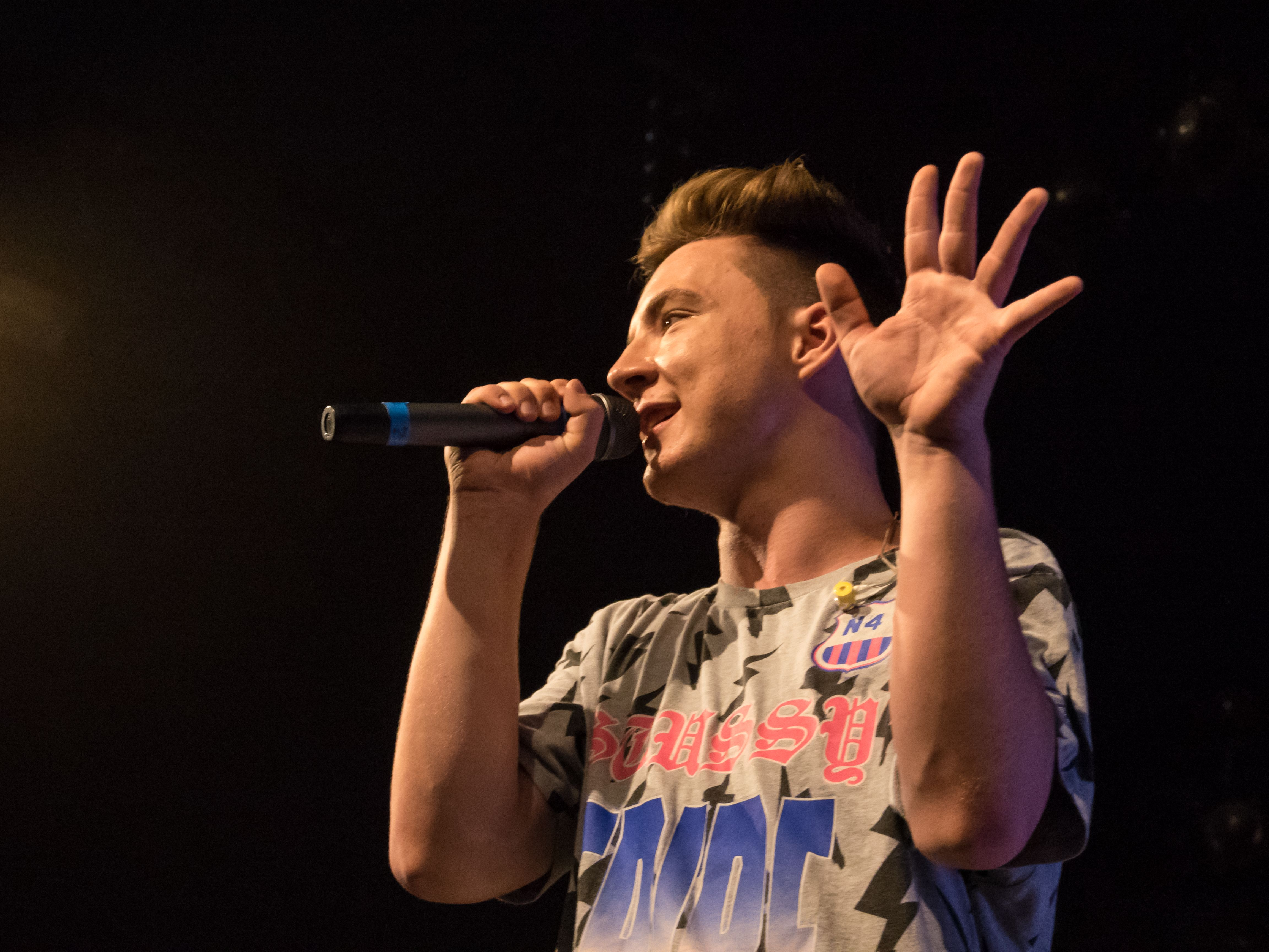 Bilder vom Zelt Musik Festival 2016 in Freiburg im Breisgau Die Lochis